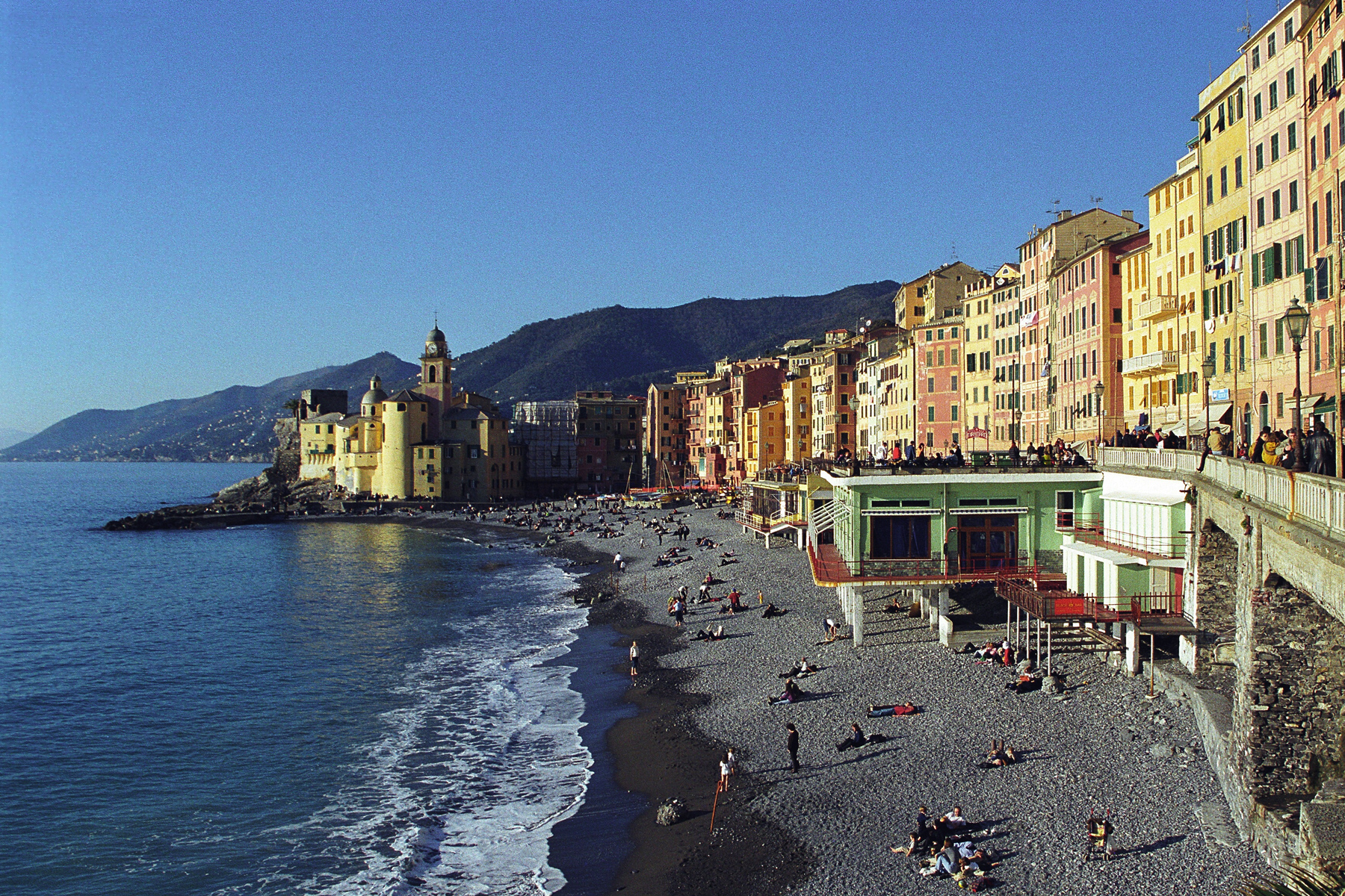 Camogli, Liguria, Italia